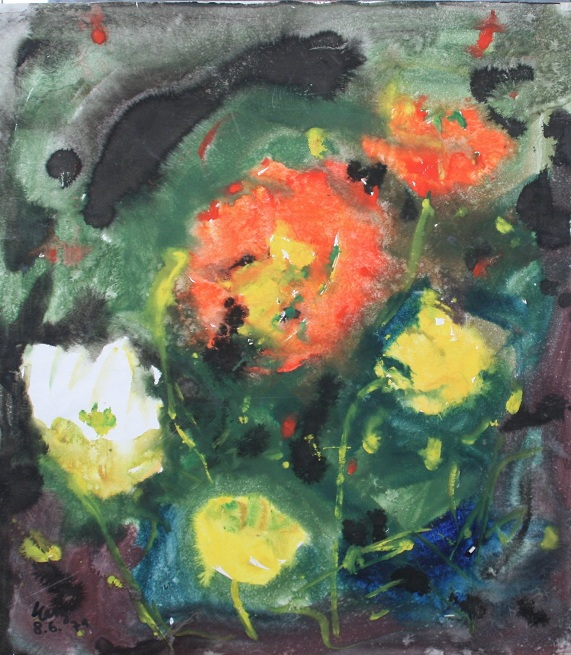 Aquarell 80 x 70 cm